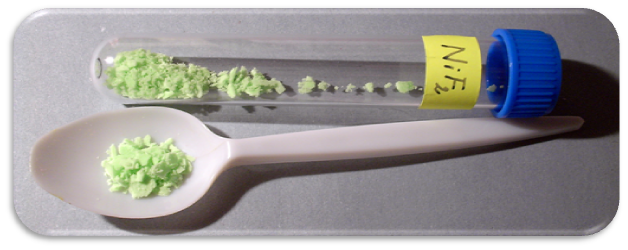 Fluorid nikelnatý - NiF2